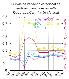 Curvas de variación estacional de la quebrada Camiña en Altusa. # Comisión Nacional de Riego # DIAGNÓSTICO ACTUAL DEL RIEGO Y DRENAJE EN CHILE Y SU PROYECCIÓN INFORME FINAL DIAGNÓSTICO DEL RIEGO Y DRENAJE EN LA I REGIÓN FEBRERO - 2003 # Santiago de Chile # url: # urlarchivo: # Anexo Estación 6 (pág. 71 del navegador pdf) mes 95% 90% 85% 50% 20% oct 0.170 0.180 0.190 0.220 0.260 nov 0.150 0.160 0.160 0.200 0.240 dic 0.170 0.180 0.190 0.230 0.280 ene 0.050 0.120 0.180 0.450 0.760 feb 0.210 0.260 0.290 0.490 0.710 mar 0.160 0.210 0.250 0.450 0.680 abr 0.190 0.210 0.220 0.270 0.320 may 0.190 0.200 0.210 0.270 0.340 jun 0.210 0.220 0.230 0.270 0.310 jul 0.230 0.240 0.250 0.300 0.360 ago 0.210 0.220 0.230 0.270 0.320 sep 0.200 0.210 0.220 0.260 0.310 This plot was created with Gnuplot.